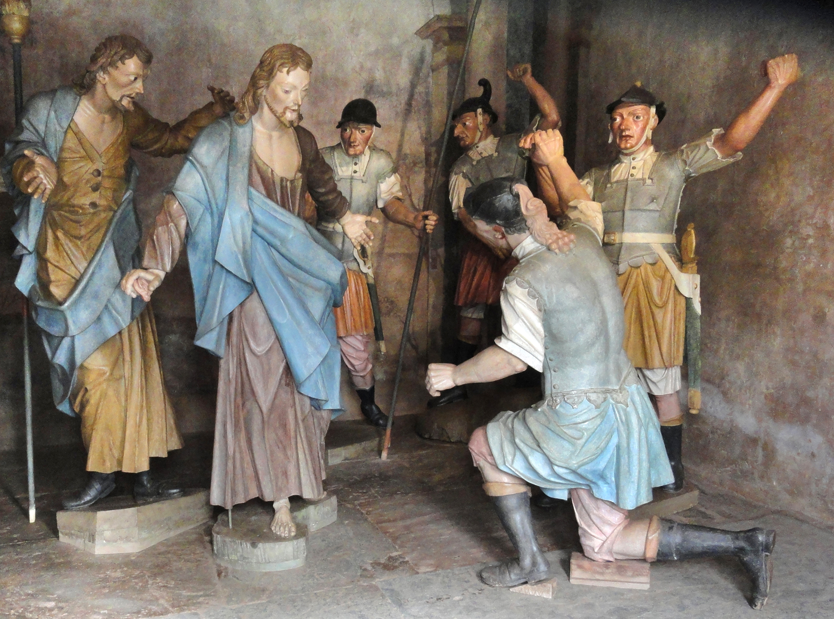 Jesus restaura a orelha de Malco. Grupo escultórico de Aleijadinho, no Santuário de Congonhas